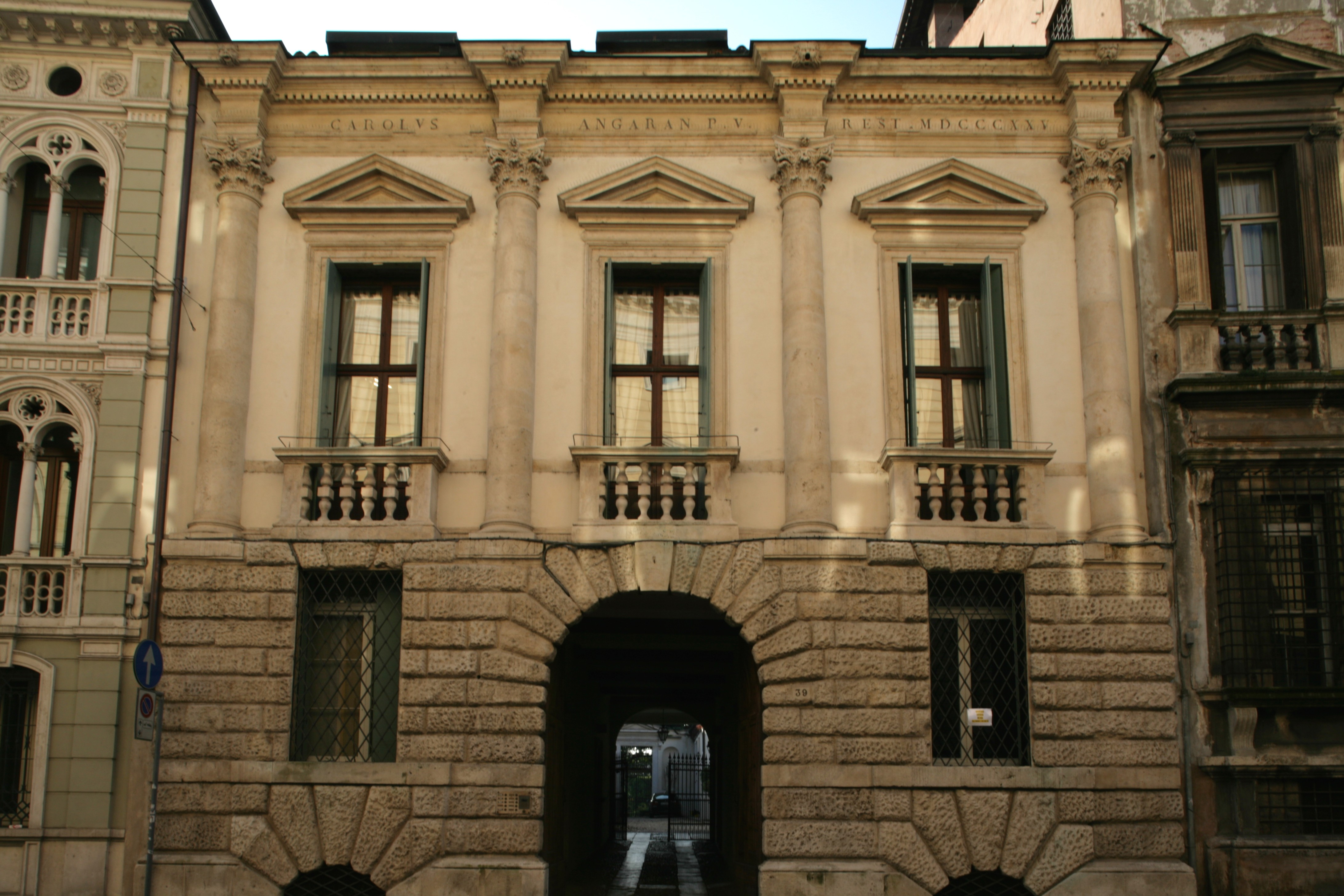 Palazzo Schio in Vicenza, designed by Andrea Palladio